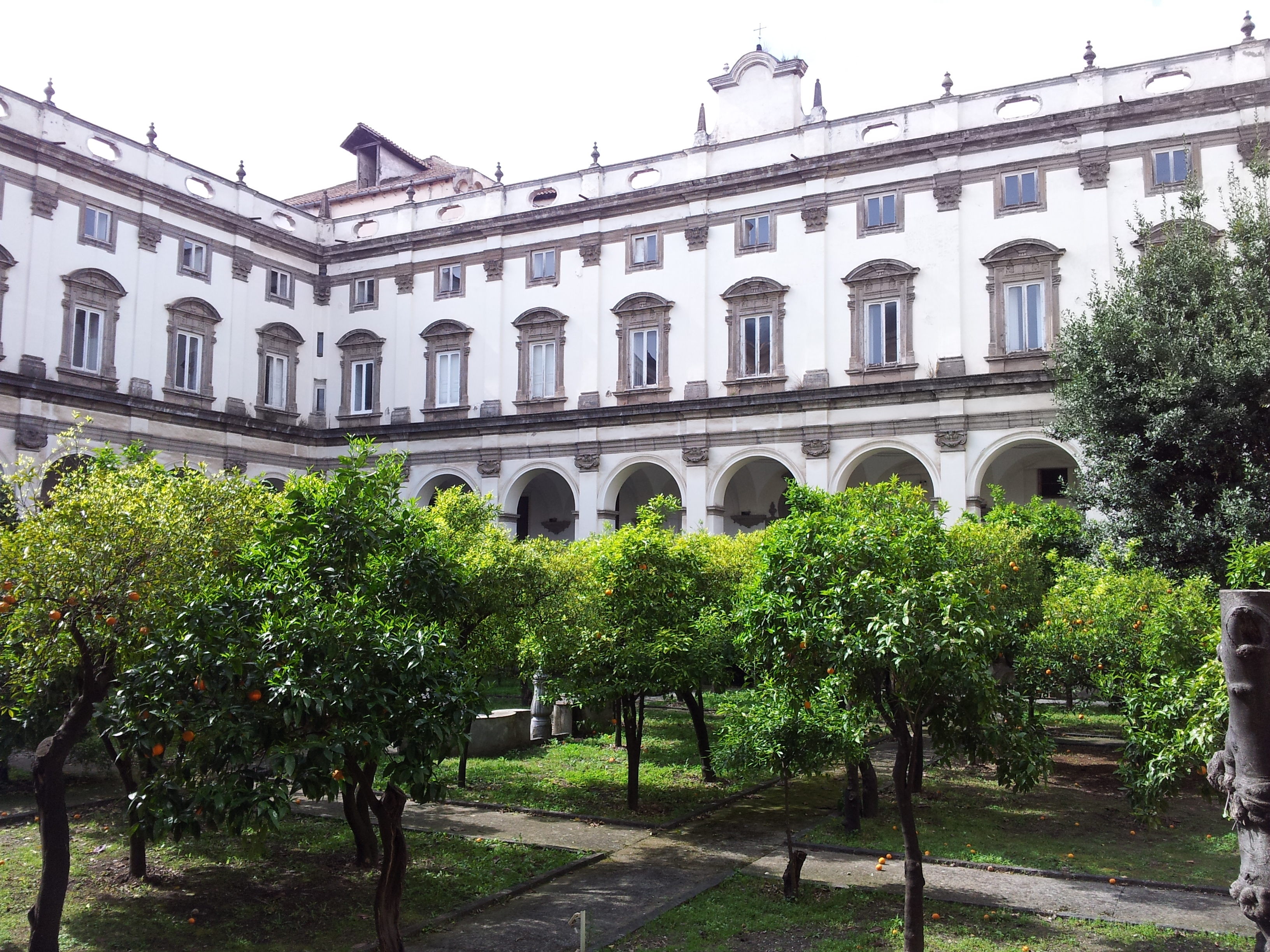 Chiostro degli Aranci (Chiostro grande dei Girolamini, Napoli)